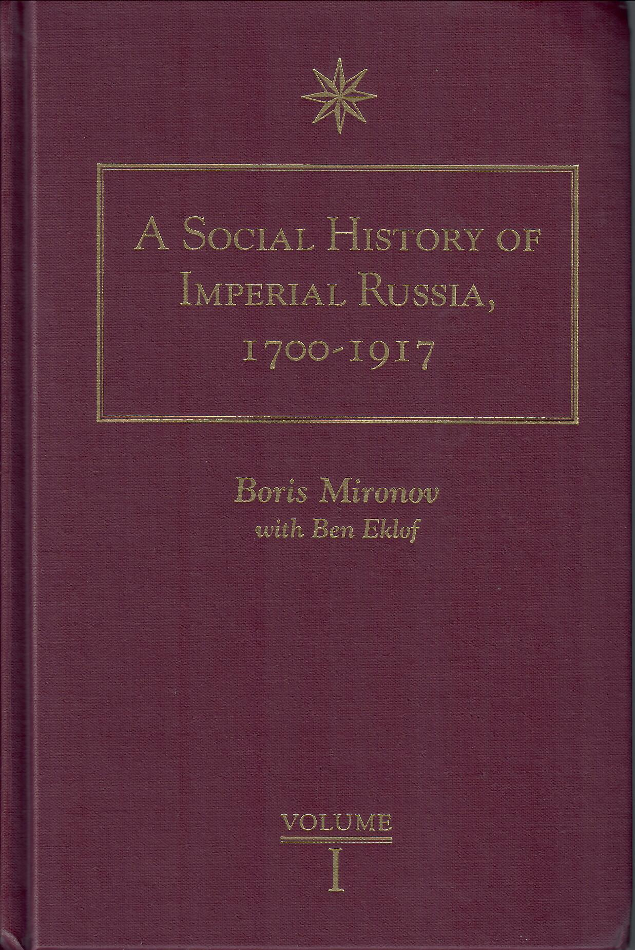 Обложка американского издания